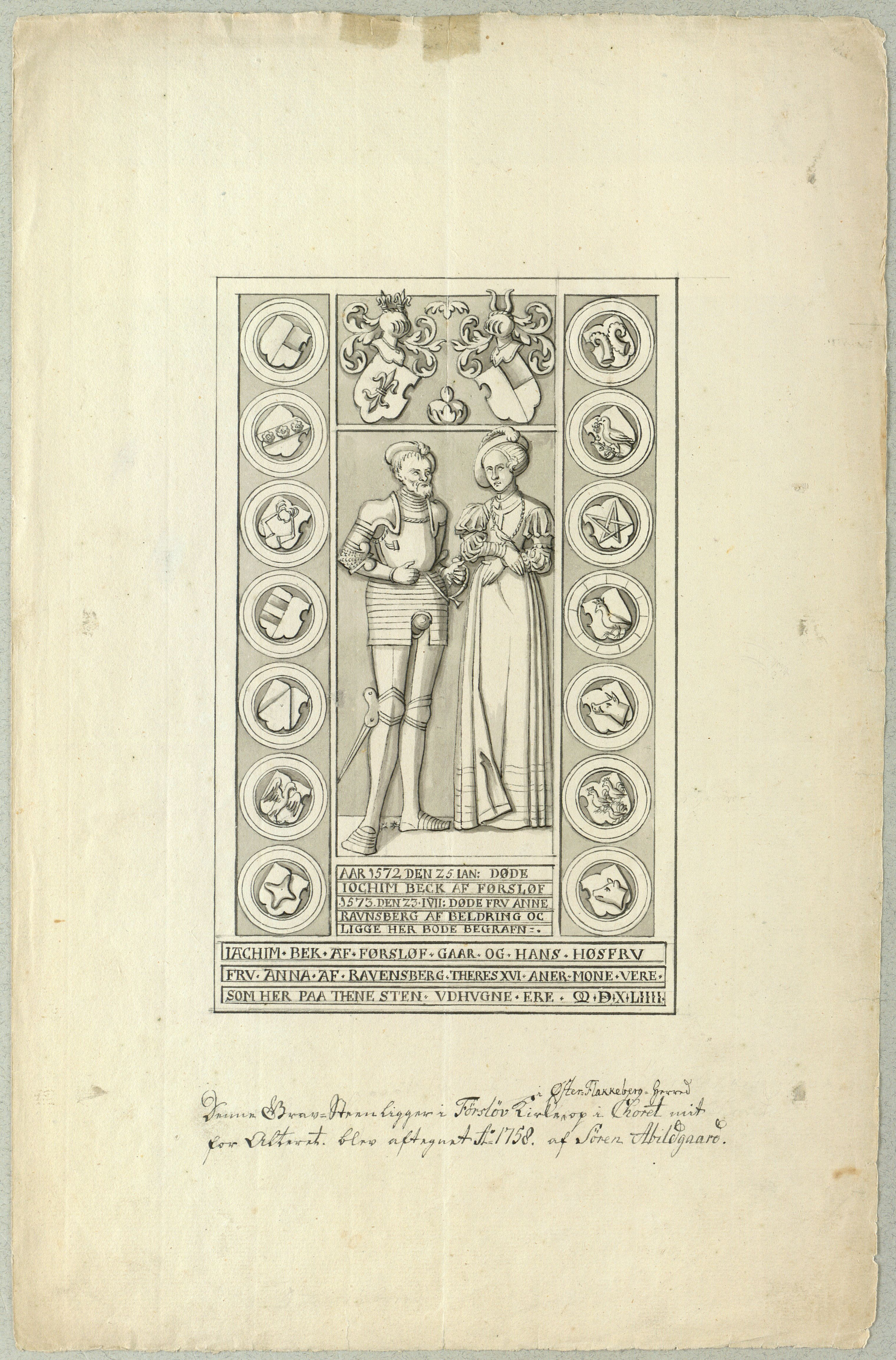 Gravsten, 1544. Joachim Beck, †1572, og hustru Anna Ravnsberg, †1573. Beskrivelse Denne Grav-Steen ligger i Førslev Kirke i Øster Flakkeberg Herred i Choret mit for Alteret. Blev aftegnet Ao 1758. af Søren Abildgaard. 25 x 38 cm.